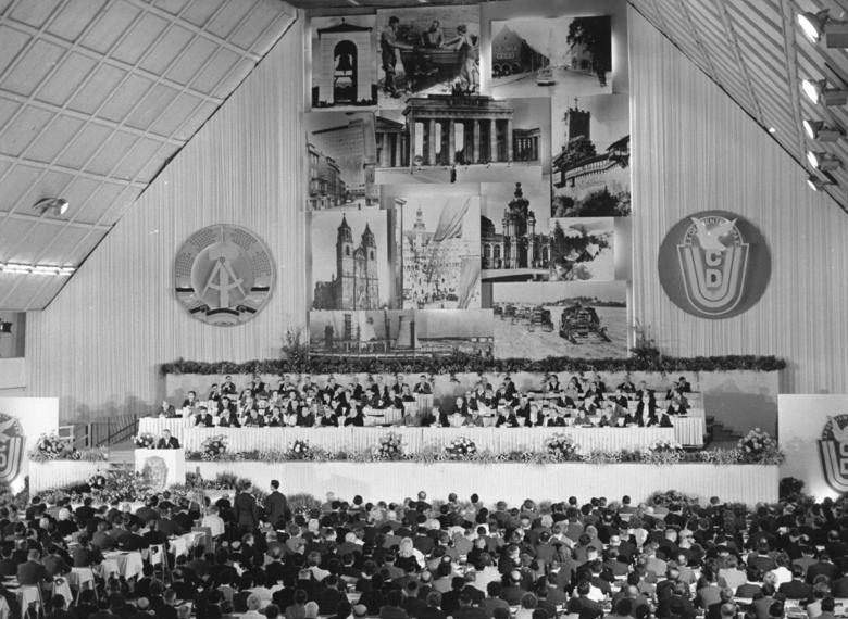 Zentralbild - Nl-At. 30.9.1964 11. Parteitag der CDU in Erfurt eröffnet. In der festlich geschmückten Erfurter Thüringenhalle wurde am Vormittag des 30.9.1964 der 11. Parteitag der Christlich-demokratischen Union eröffnet. UBz. Übersicht mit Blick auf das Präsidium des Parteitages.